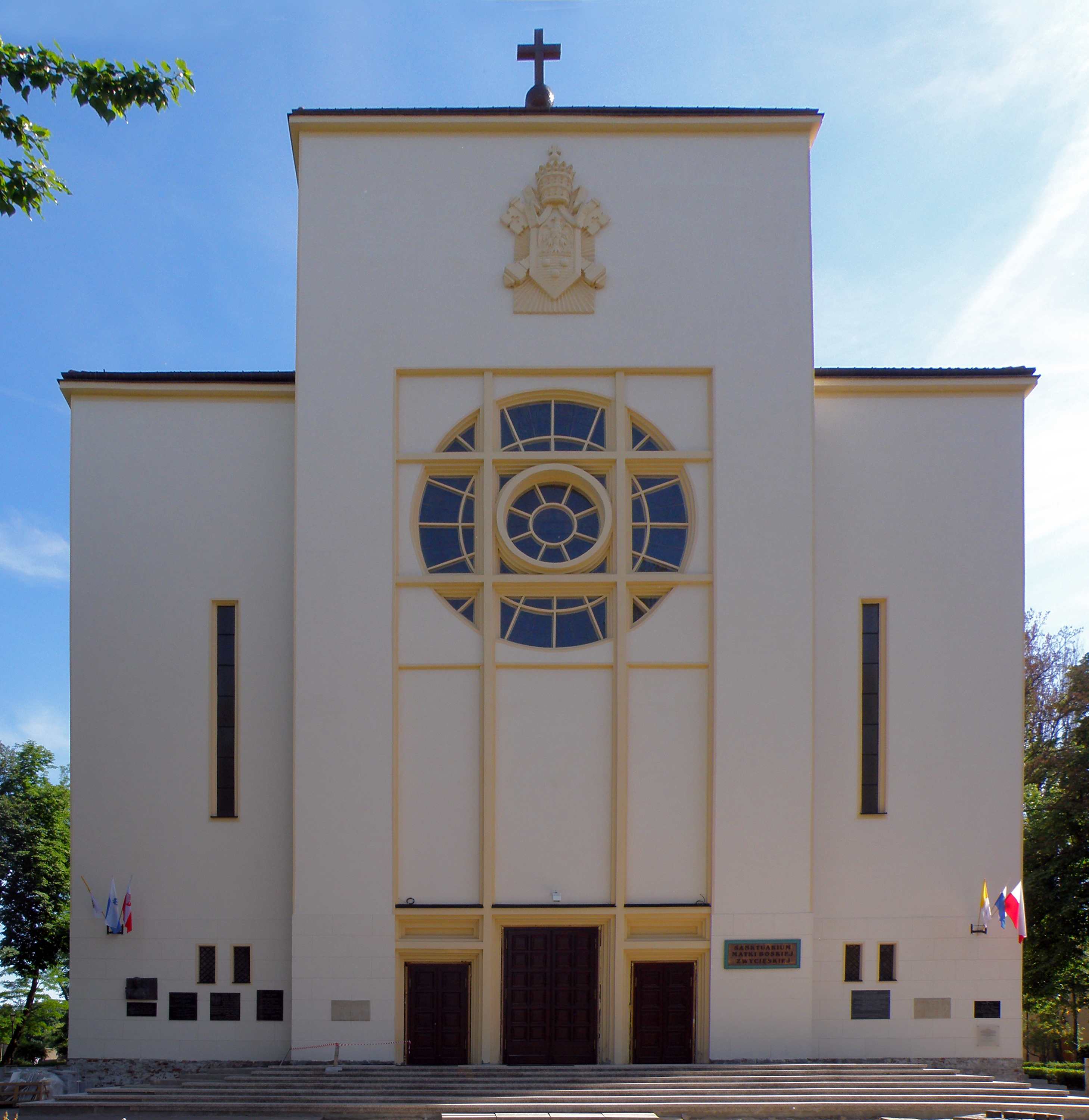 Zespół kościoła MB Zwycięskiej (983 A z 23.06.1979), ul. Grochowska 365, Warszawa